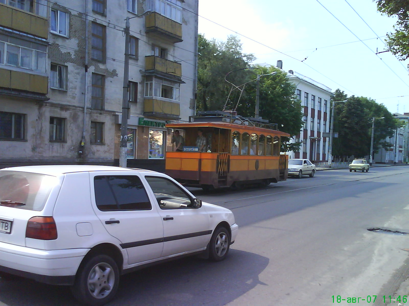 Трамваю в Житомире - 100 лет